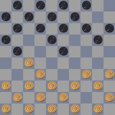 Zelfgemaakt diagrammetje